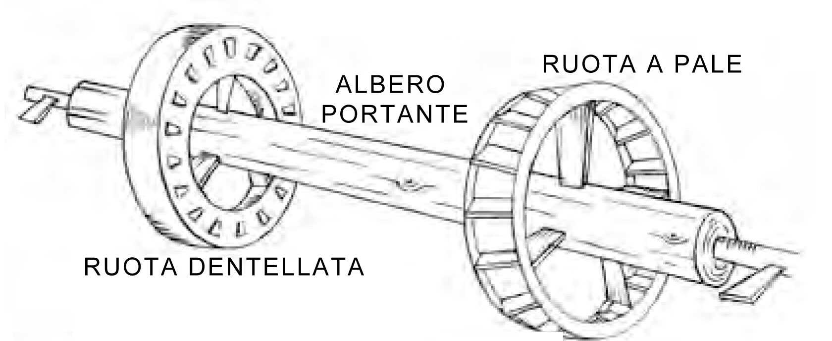 Albero a pale fisse